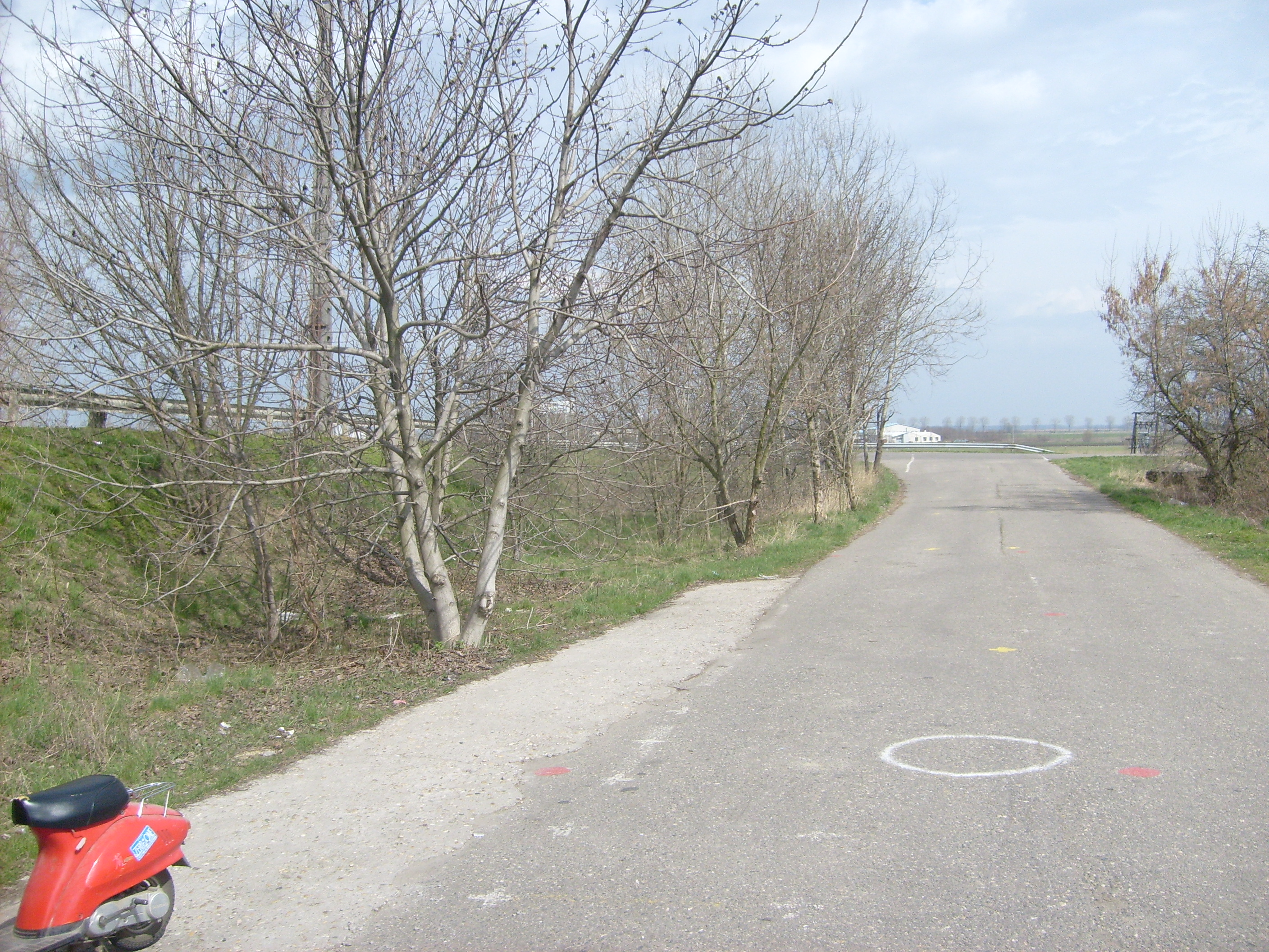 Kettős Körös-híd Békésen, a régi vasszerkezetű hídre felvezető nyomvonal Tarhos felől